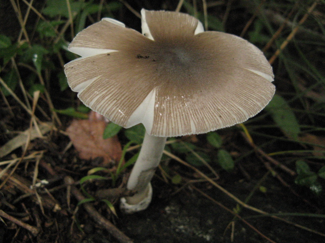 Amanita vaginata